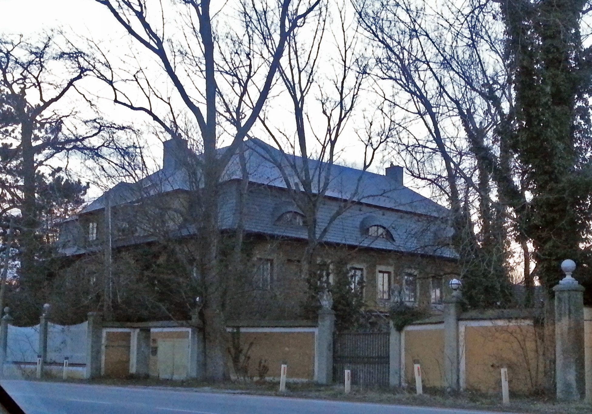 Rendezvous Gebäude in Wien